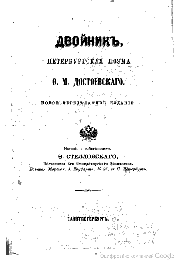 Обложка издания 1866 года